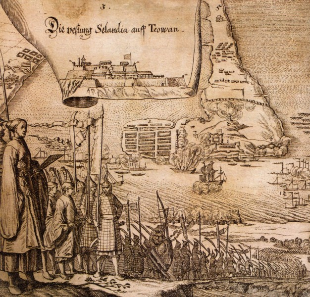 中文（台灣）: 東印度旅行短記鄭荷交戰圖。